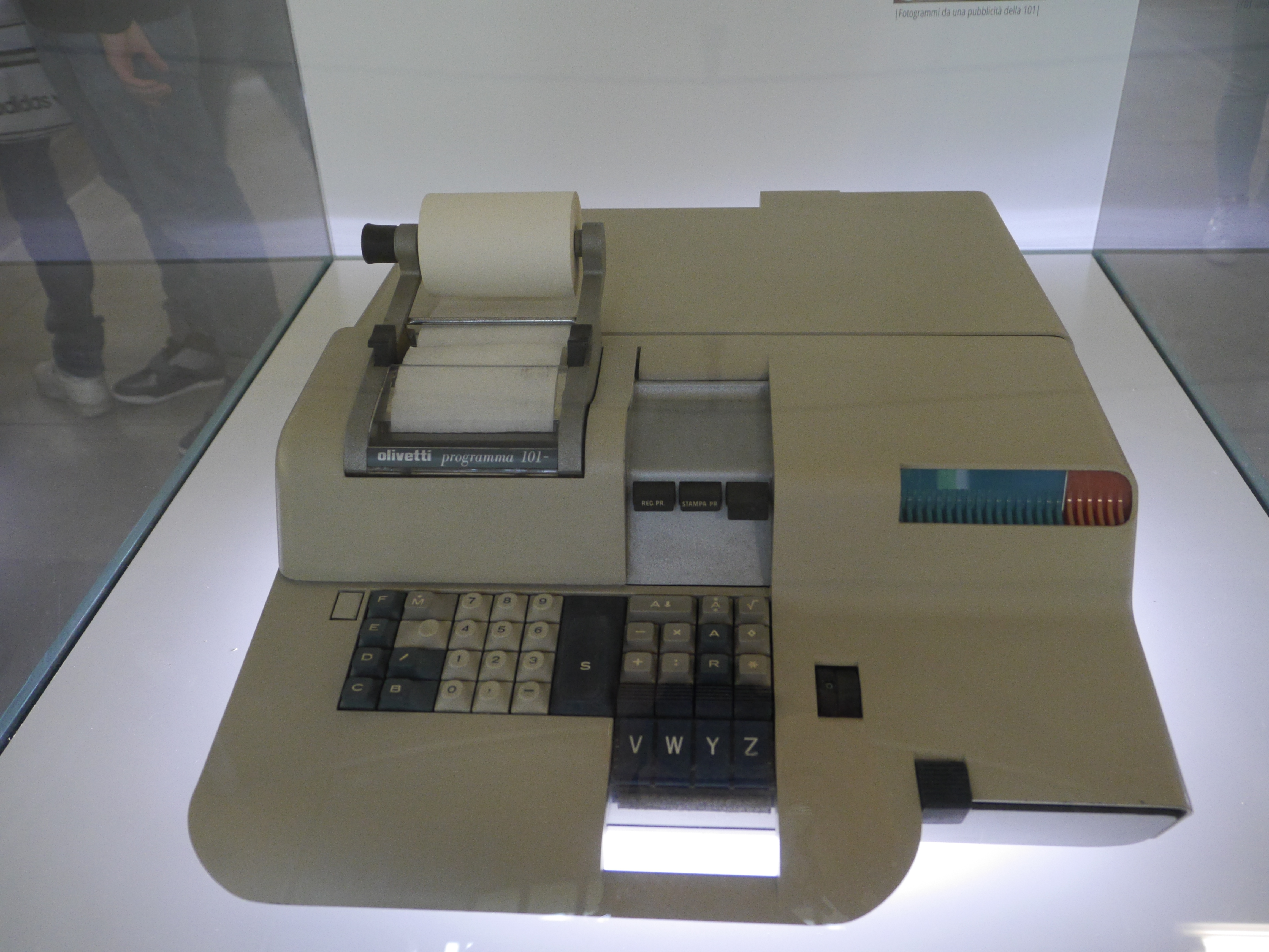 Olivetti Programma 101 This photo was taken with Panasonic Lumix DMC-GH3 camera, thanks to Panasonic.You can see all photographs in category: Taken with Panasonic Lumix DMC-GH3.